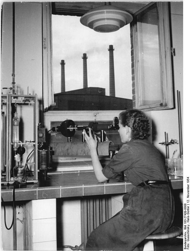 Zentralbild-Quasch Hein-Qu 8 Mot. 12.11.1954 VEB Stahl- und Walzwerk Brandenburg-Havel Das Werk wurde durch ein neues Laboratorium vergrößert. Laborantin Rita Kohl bei der Phosphorbestimmung einer Stahlprobe mit dem Fotometer.